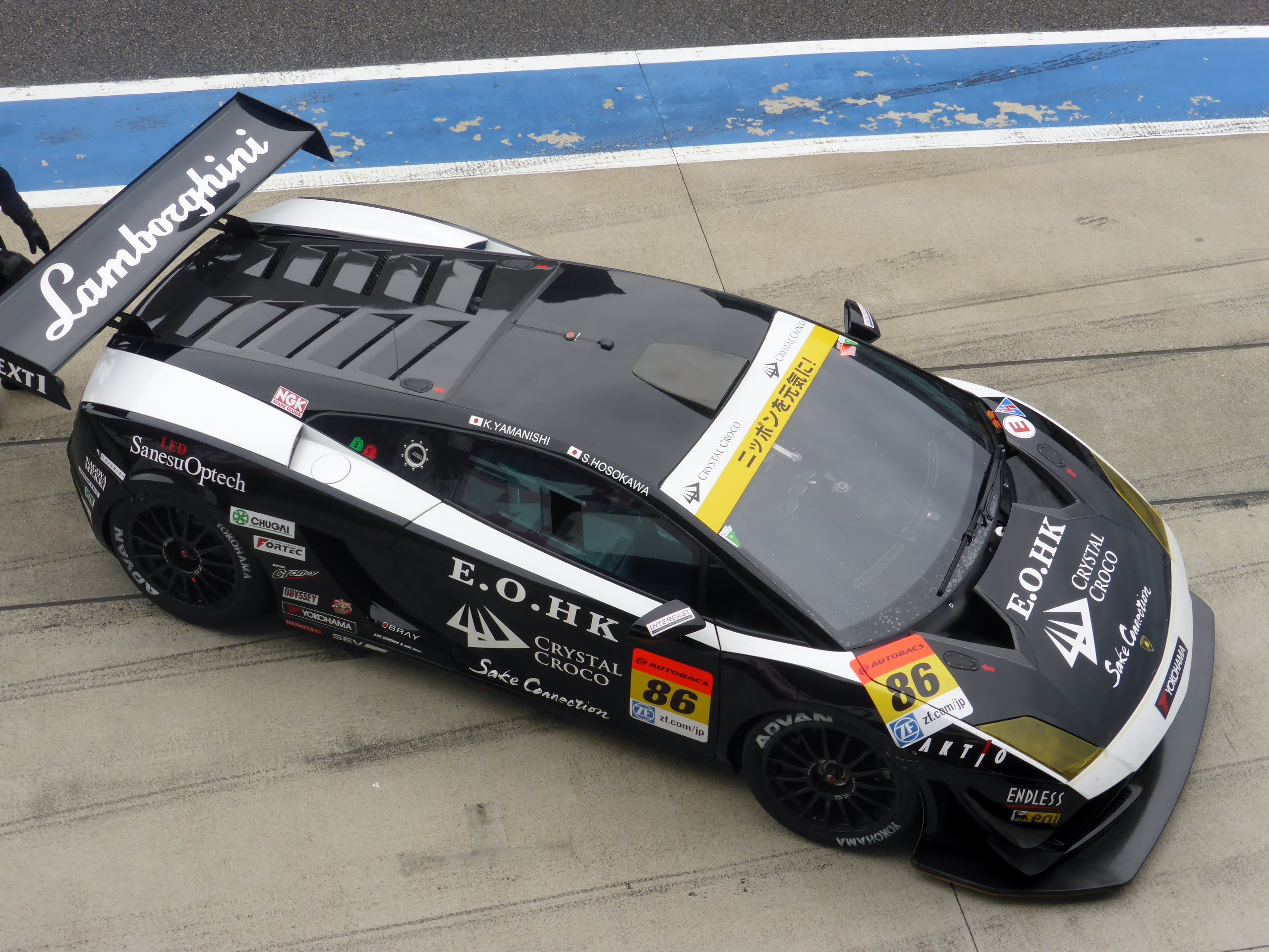 2014年6月27日に行われた鈴鹿サーキット公式テストにおける86号車クリスタルクロコランボルギーニGT3を撮影。